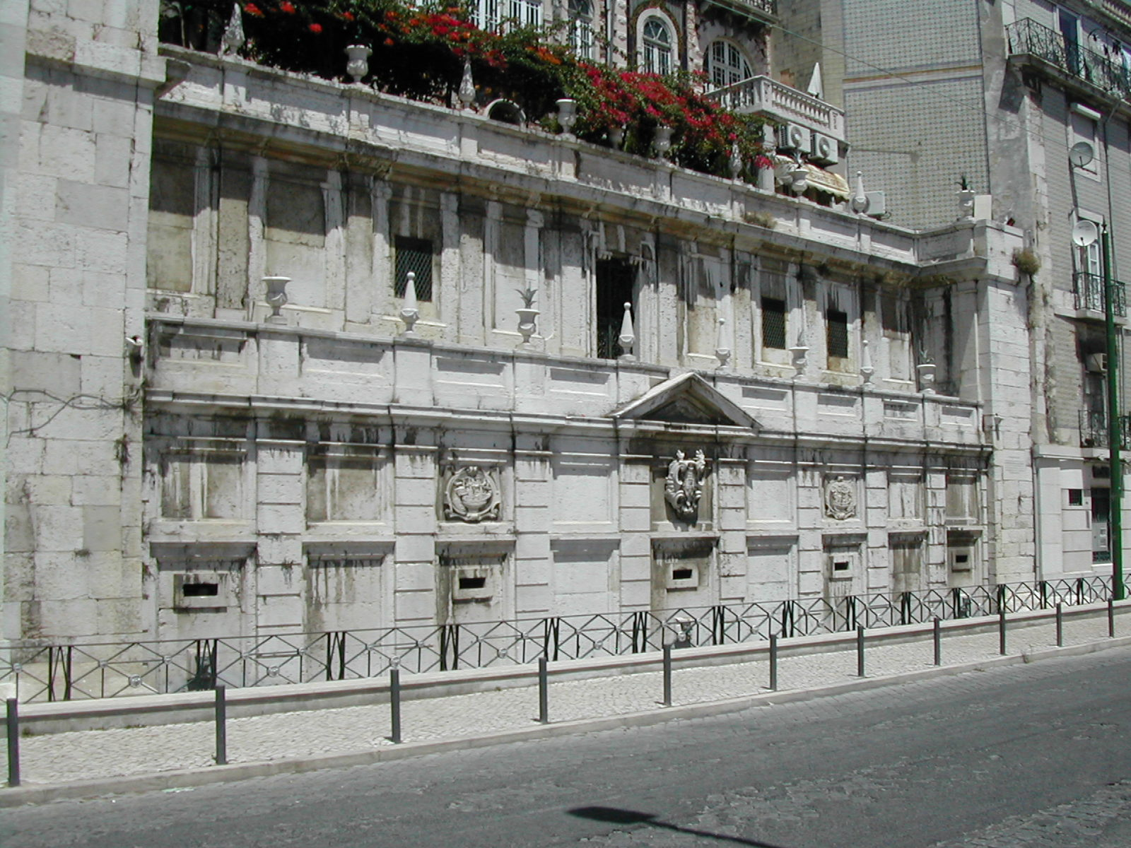 Chafariz de El-Rei, Alfama, Lisboa, Portugal